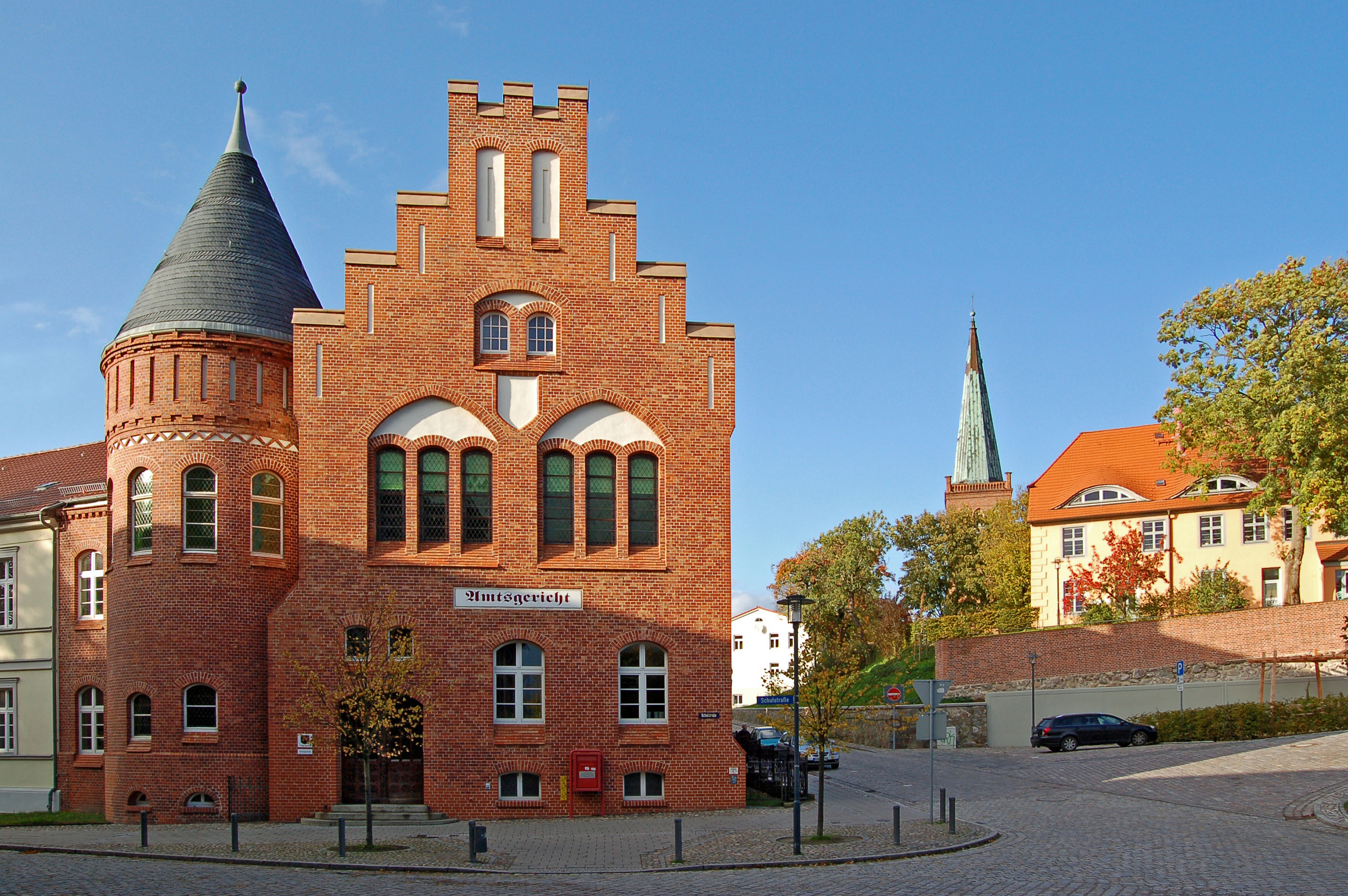 Das Amtsgericht Bergen auf Rügen gehört neben den Gerichten in Anklam, Greifswald, Ribnitz-Damgarten, Stralsund und Wolgast zu den sechs Amtsgerichten des Landgerichts Stralsund. Es ist erstinstanzliches Gericht für Zivil-, Familien- und Strafrecht. Wann es erbaut wurde, konnte ich leider nicht in Erfahrung bringen. - Der Backsteinbau ist nach der gelungenen Renovierung wieder ein echter Hingucker.